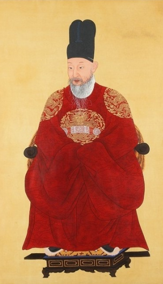 1744년 영조 51세 때 사대부 화가 조영석 등이 그린 어진을 1900년(광무4년) 조석진·채용신 등이 모사한 영조 반신상이다. 현재 어진실Ⅱ에 있는 영조어진은 1900년의 반신상 어진을 토대로 하여 전신상으로 모사한 것이다. - 어진박물관 설명